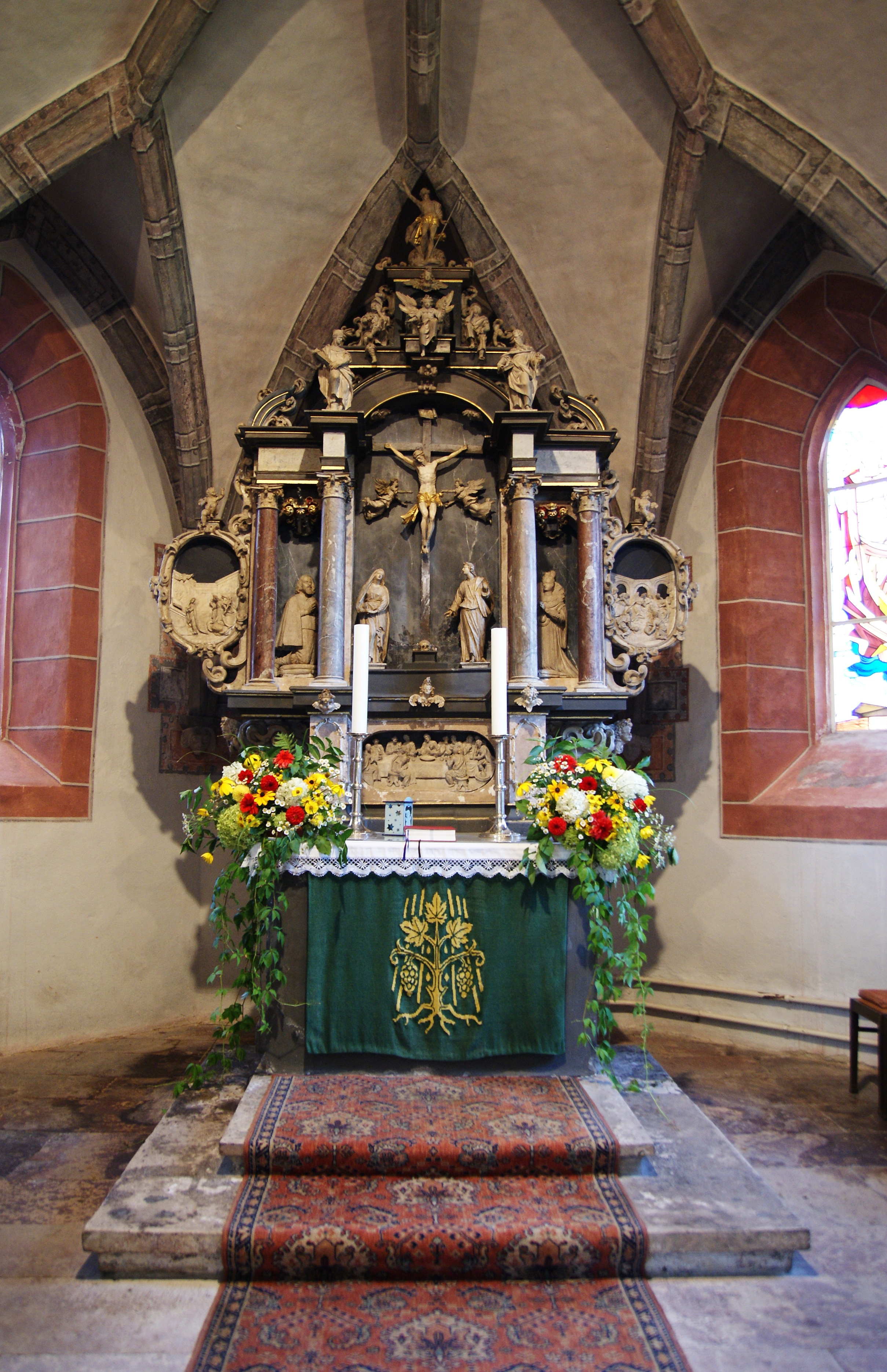 Kirche Großolbersdorf, Altar